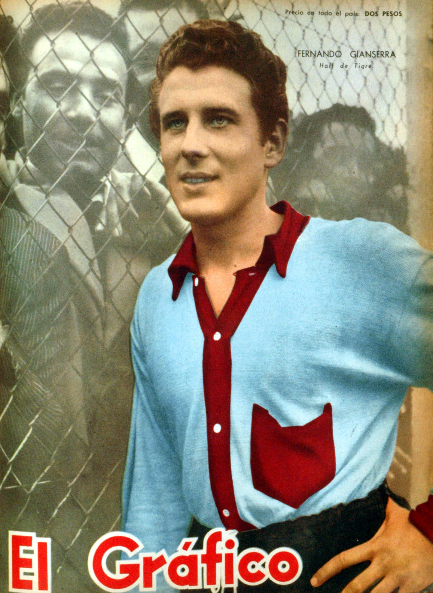 El Grafico del 17 de Agosto de 1956. Edicion 1930